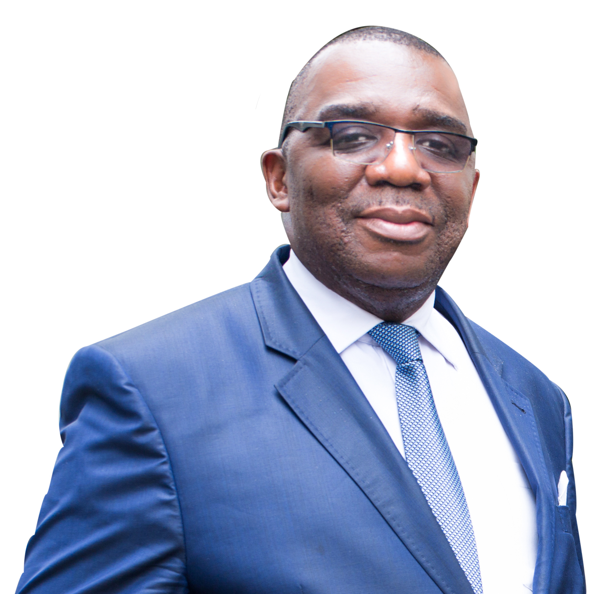 Lugi Gizenga, Secrétaire Permenent du Parti Lumumbiste Unifié